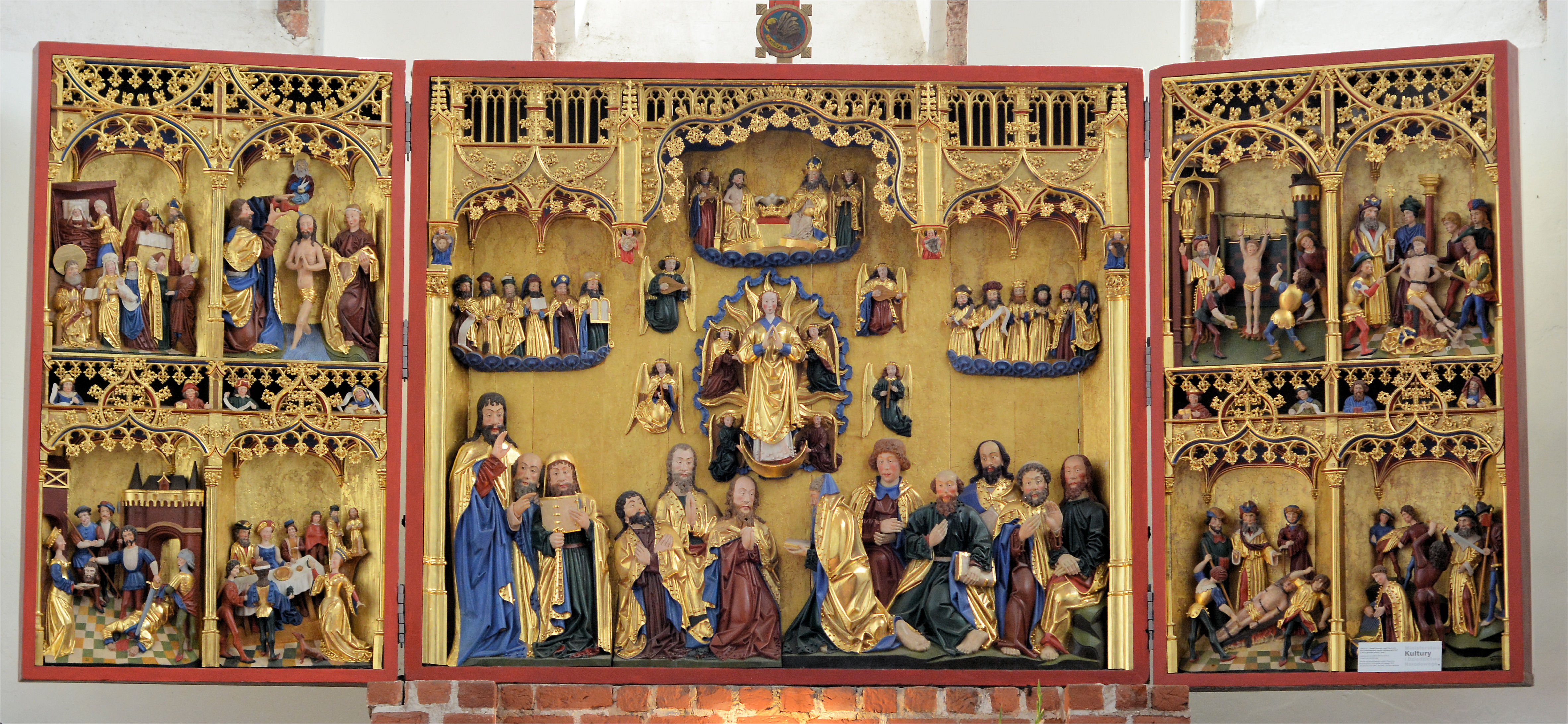 Ołtarz główny w katedrze w Kamieniu Pomorskim